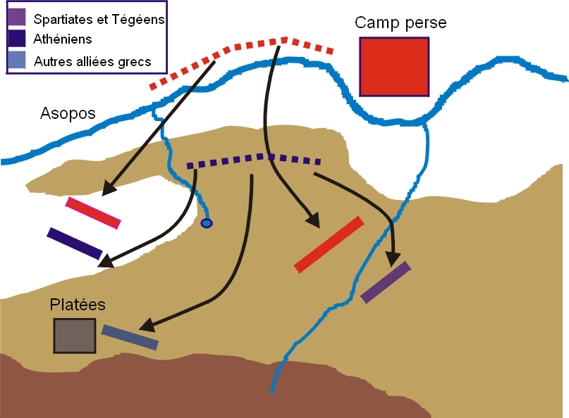 Seconde phase de la bataille de Platées